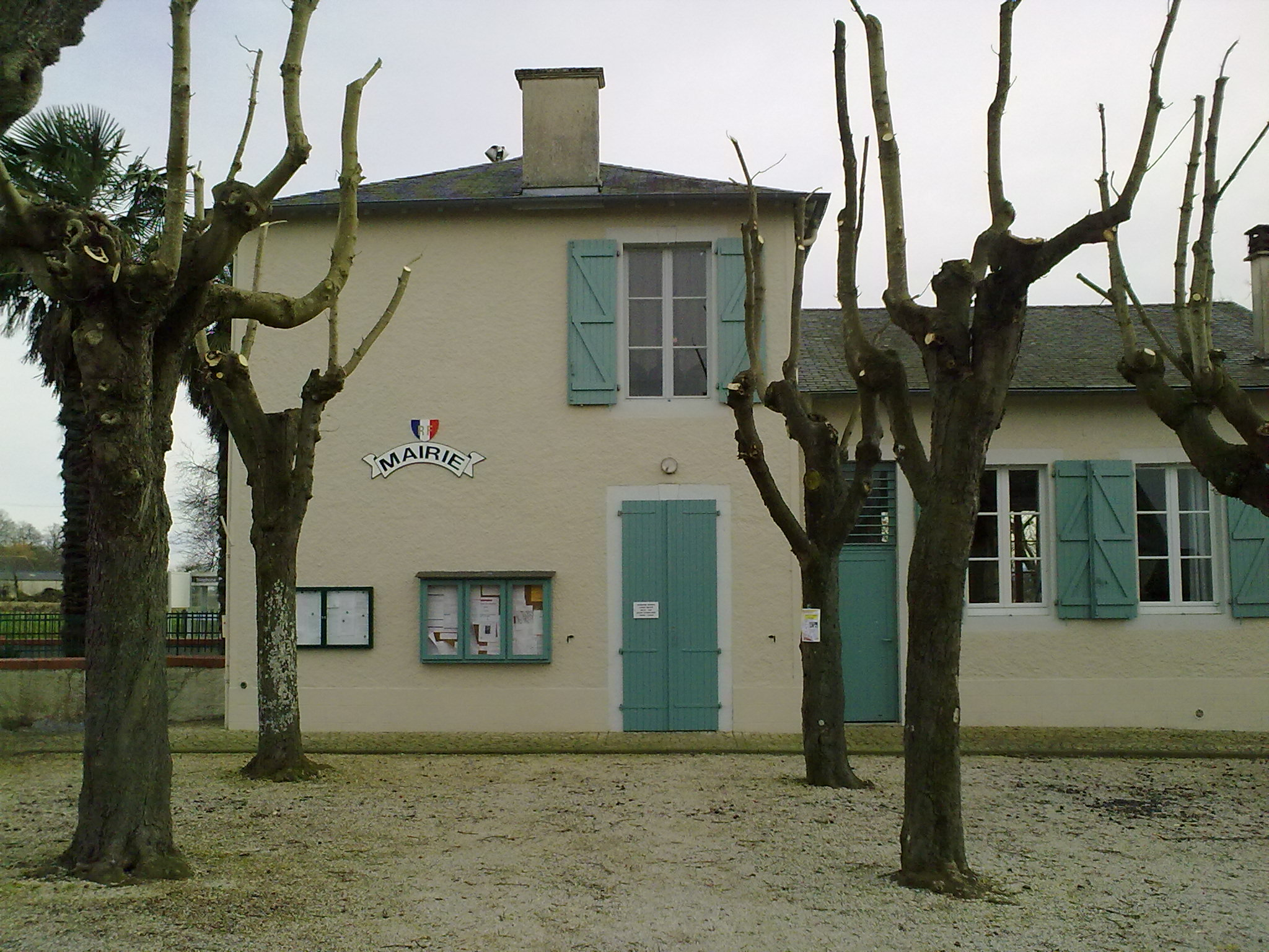 Mairie de Higuères-Souye